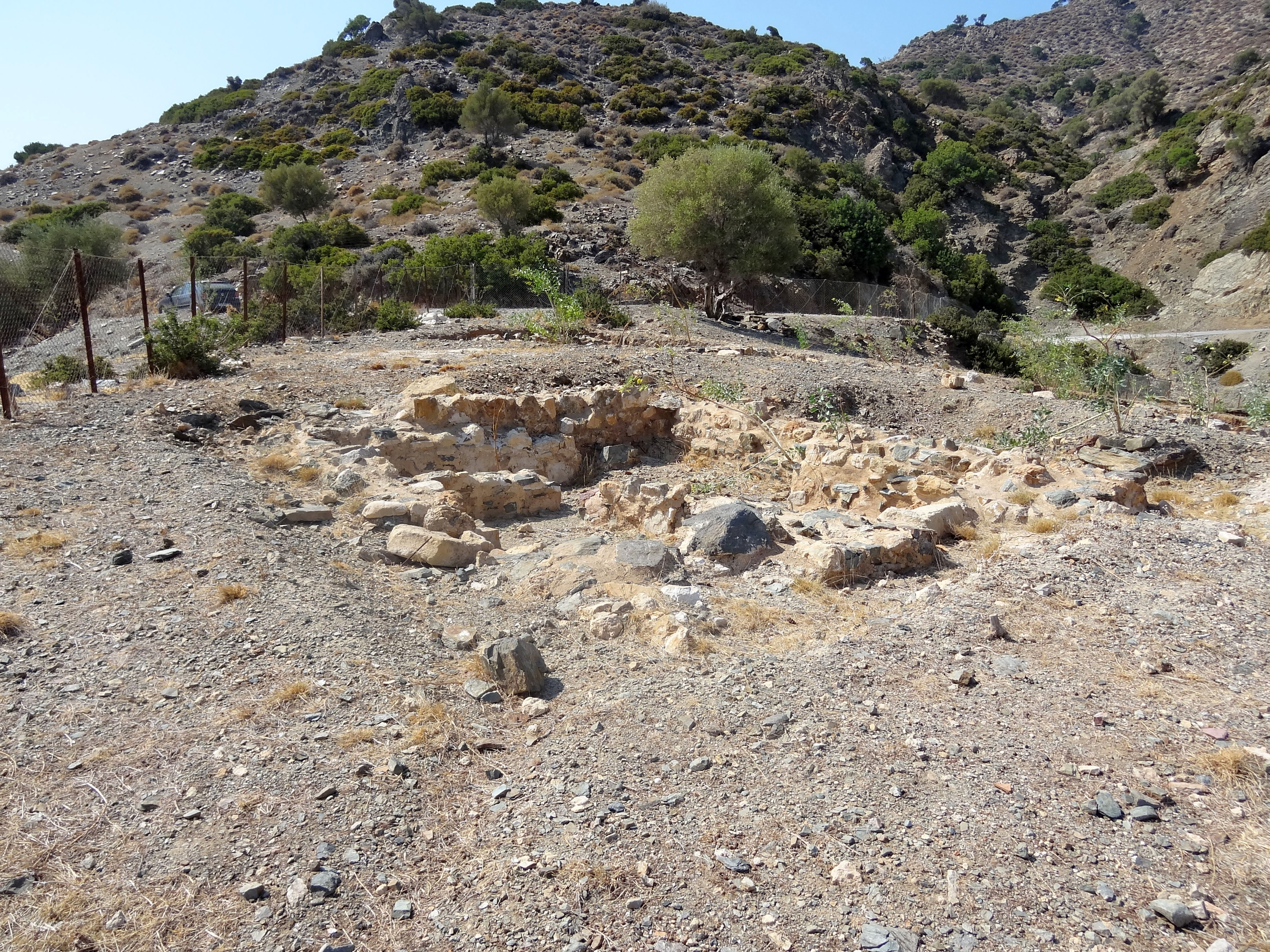 Antike Stätte von Lasaia (Λασαία), Gemeinde Festos, Regionalbezirk Iraklio, Kreta, Griechenland